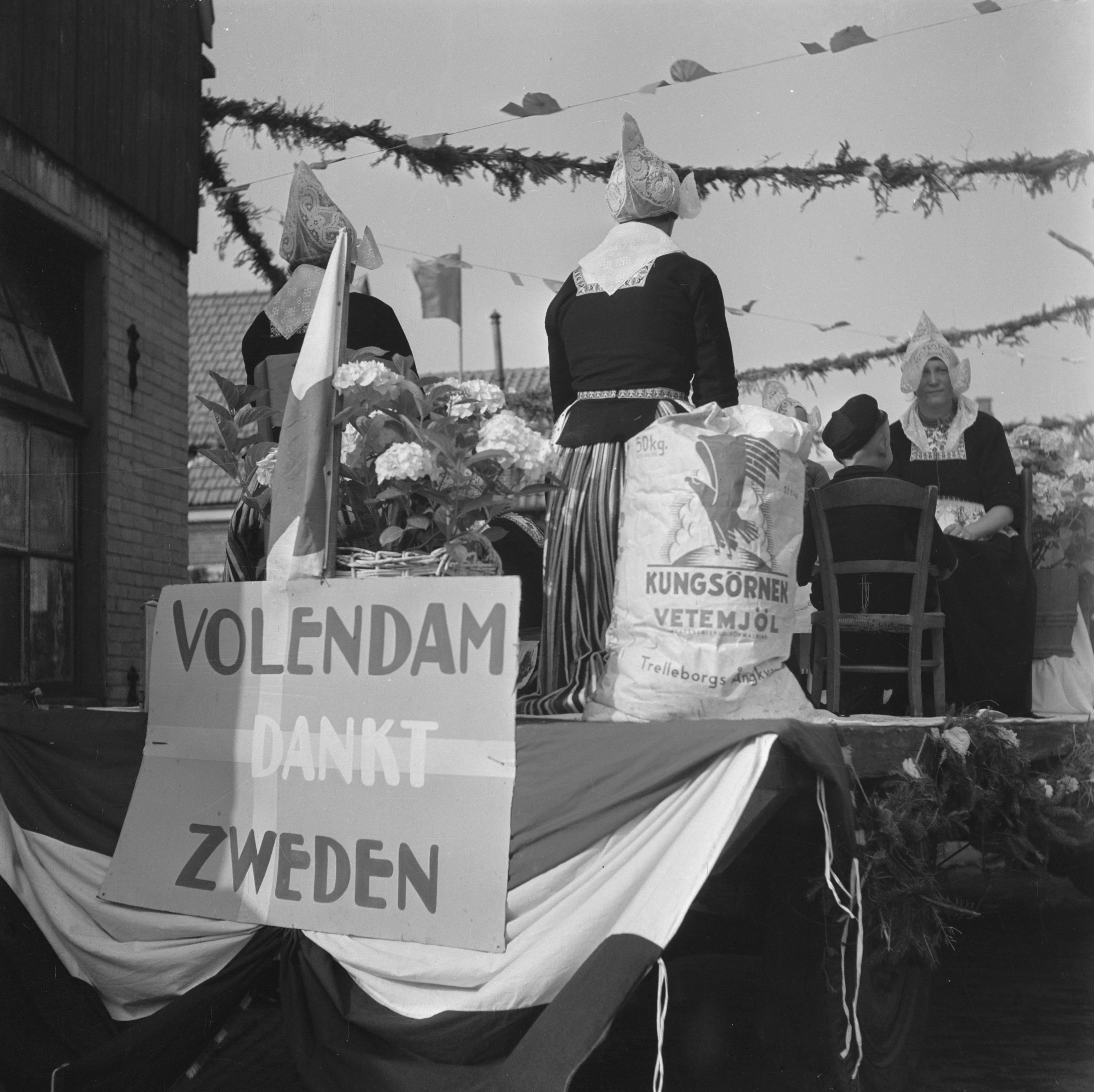 Collectie / Archief : Fotocollectie Anefo Reportage / Serie : Bevrijdingsfeesten: Volendam Beschrijving : Feesten en kermis te Volendam Annotatie : Op het podium een zak 50 kg. Zweeds tarwemeel "Kungsörnk Vetemjöl. Trelleborg" Datum : juli 1945 Locatie : Noord-Holland, Volendam Trefwoorden : Bevrijdingsfeesten, tweede wereldoorlog Fotograaf : Andriesse, Emmy / Anefo, [onbekend] Auteursrechthebbende : Nationaal Archief Materiaalsoort : Negatief (zwart/wit) Nummer archiefinventaris : bekijk toegang 2.24.01.03 Bestanddeelnummer : 900-5400